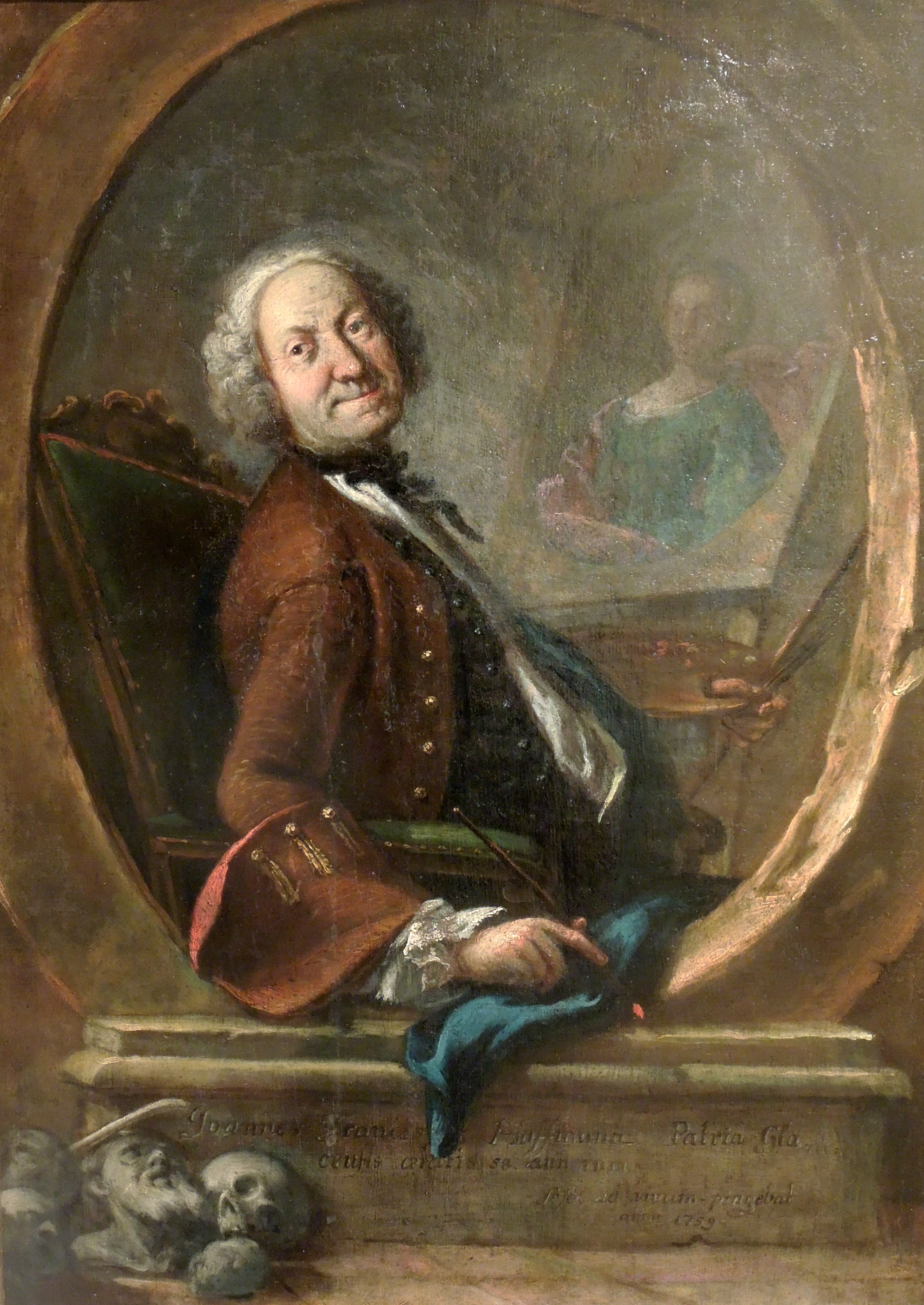 Johann Franz Hoffmann - Autoportret